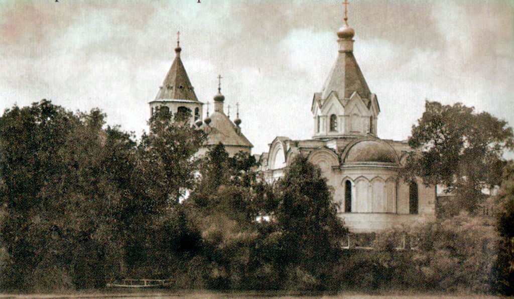 Нижне-Воскресенский единоверческий монастырь